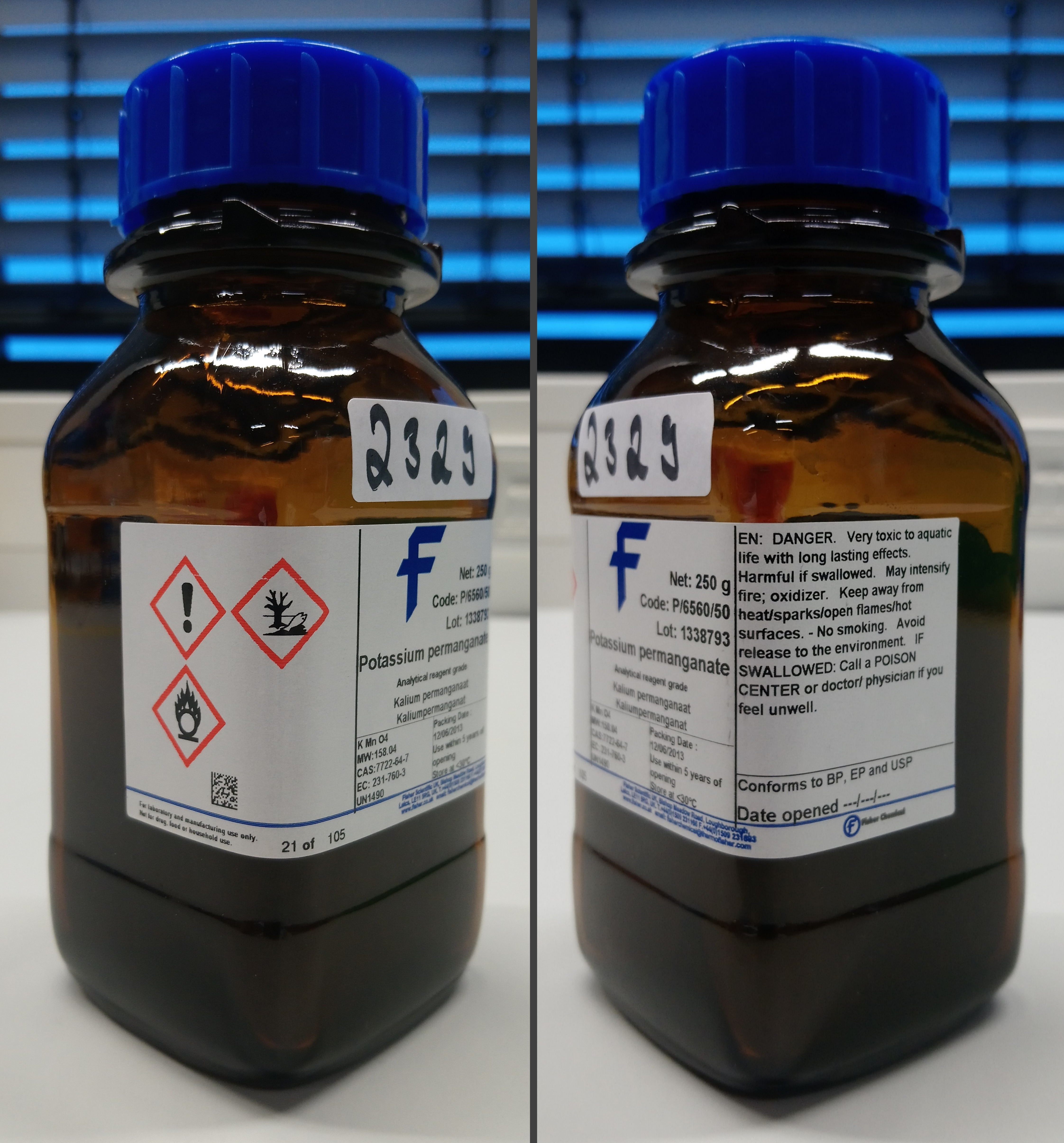 KMnO4 GHS labeling